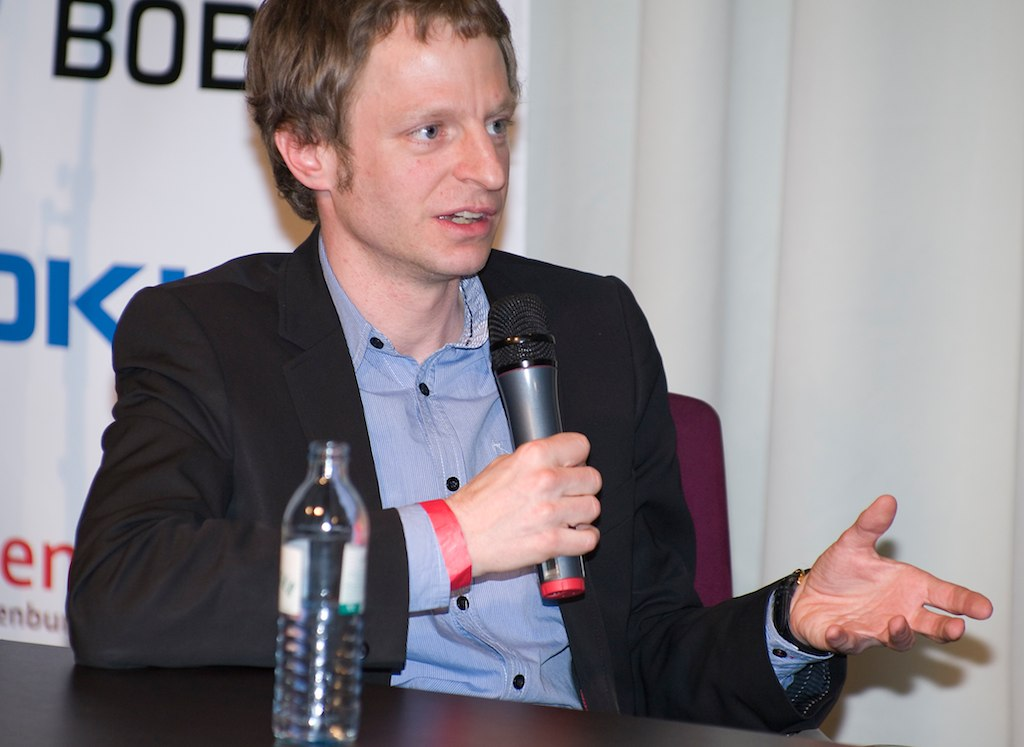 Mahret Kupka, Julia Knolle, Tillmann Prüfer, Mary Scherpe, „Wenn Prada Pakete schickt“, Kalkscheune Grosser Saal